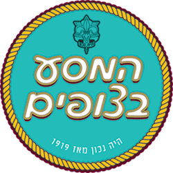 המסע בצופים - תכנית ההדרכה של תנועת הצופים העבריים בישראל